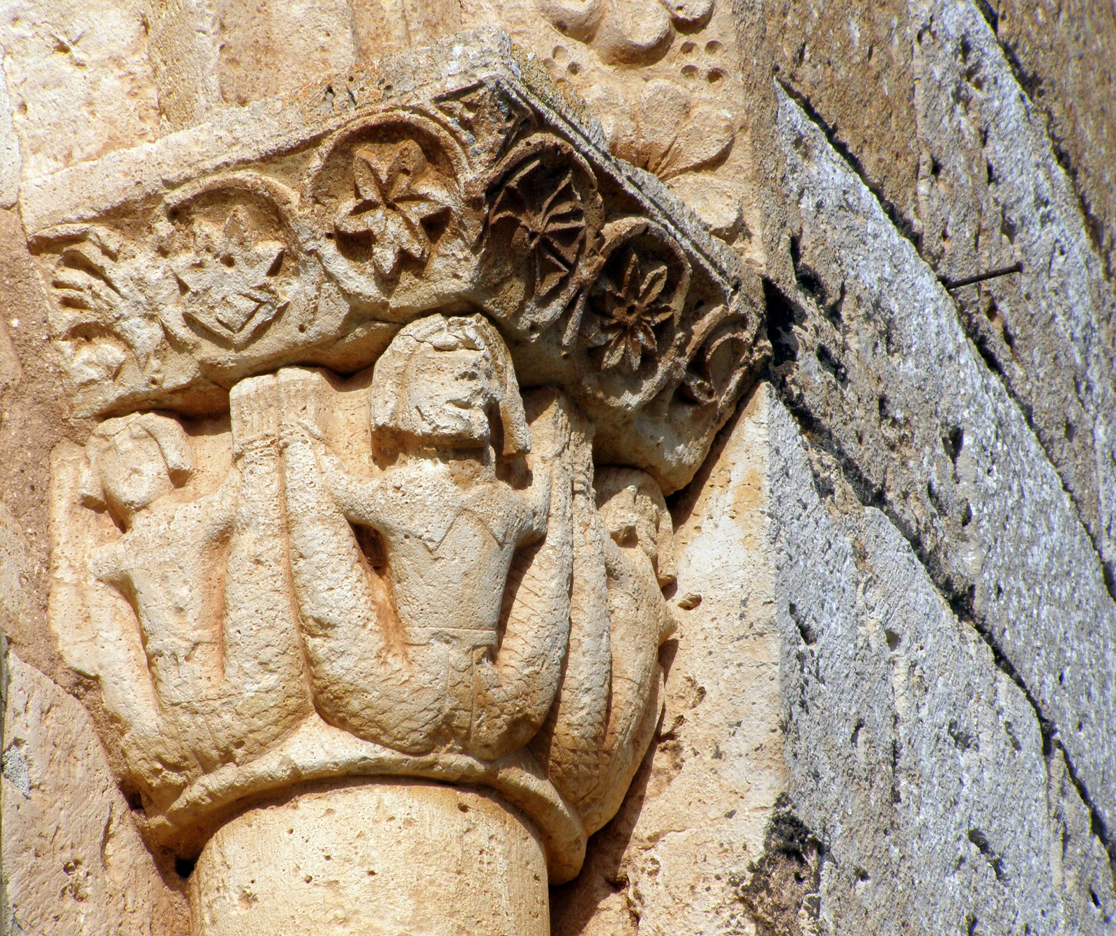 Capitel del ábside de la iglesia. Muestra tres sirenas con dos colas asidas por las manos.